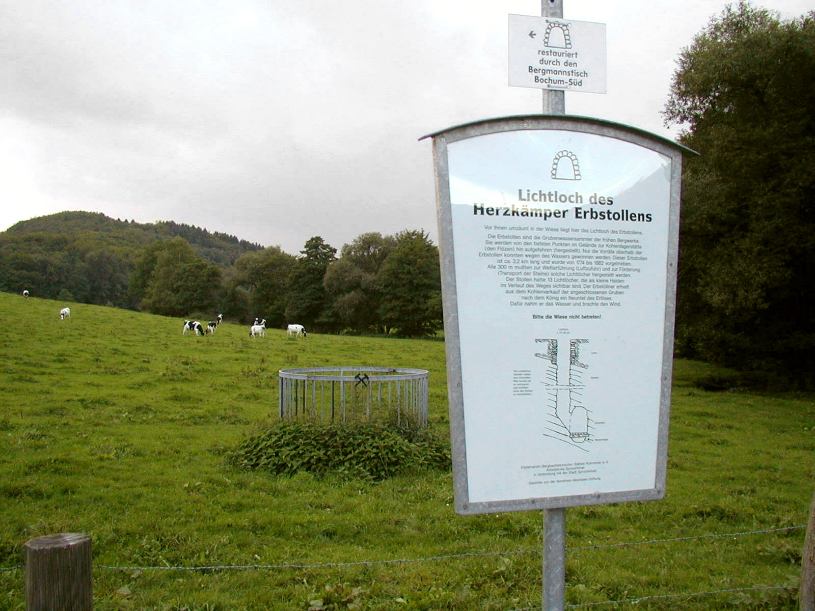 Lichtloch des Herzkämper Erbstollens auf einer Weide an der Fahrentrappe, Gemarkung Oberelfringhausen, Hattingen, Deutschland.